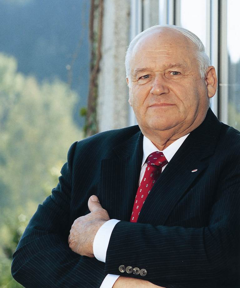 Portrait Manfred Zollner sen.